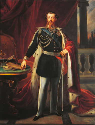 Vittorio Emanuele II di Savoia (1820-1878)